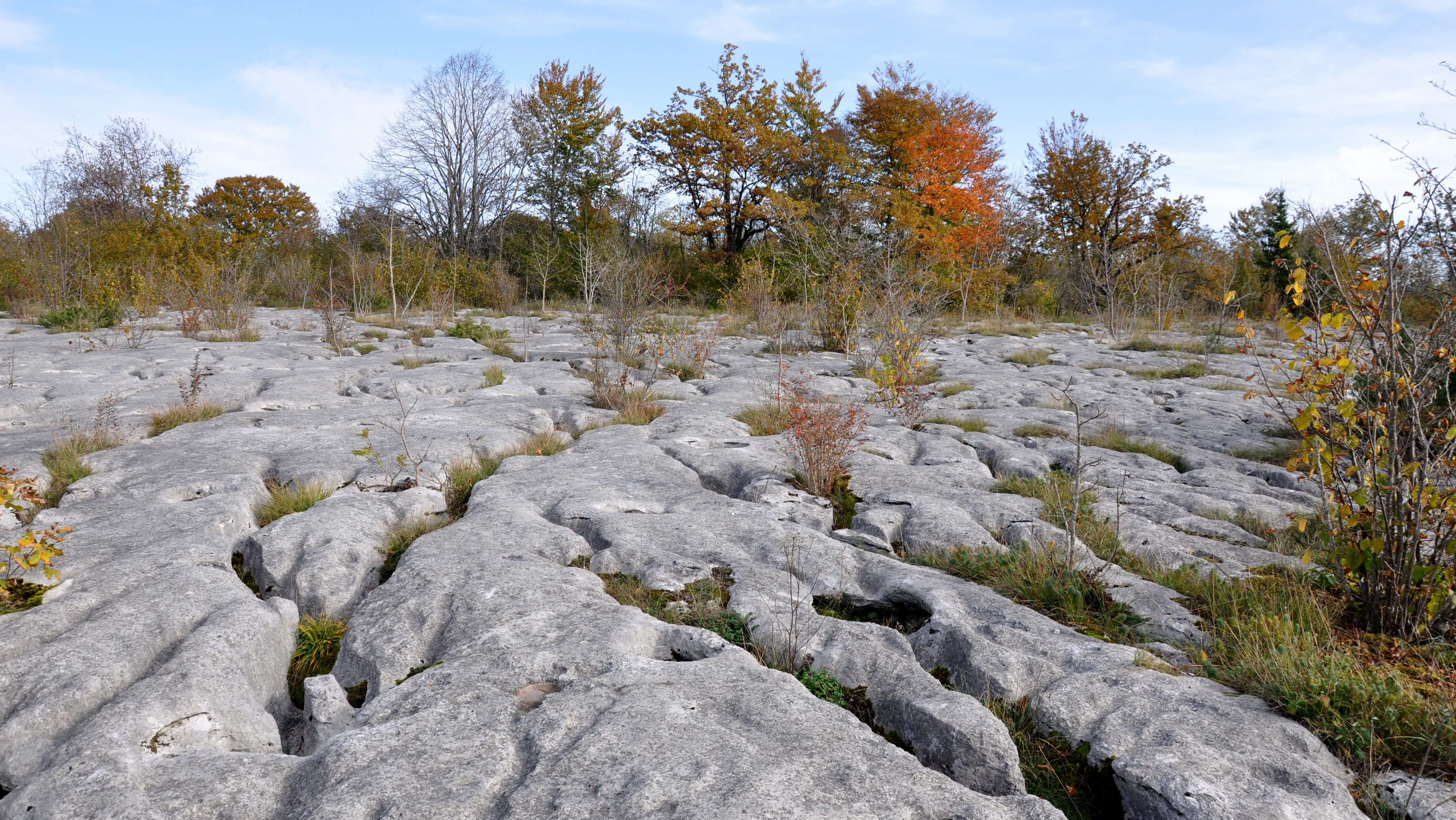 relief karstique à Loulles (Jura)